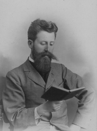 Photo de Jean adressée par Jean à Gabriel